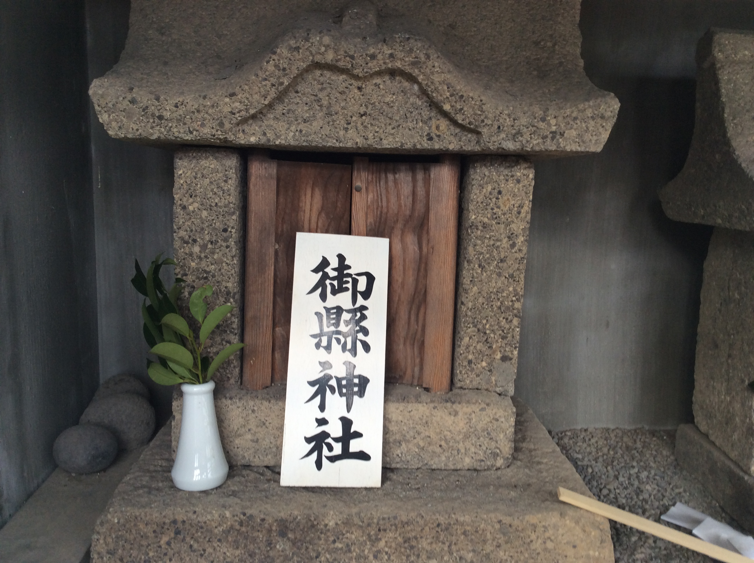 御縣神社（豊国神社境内社）